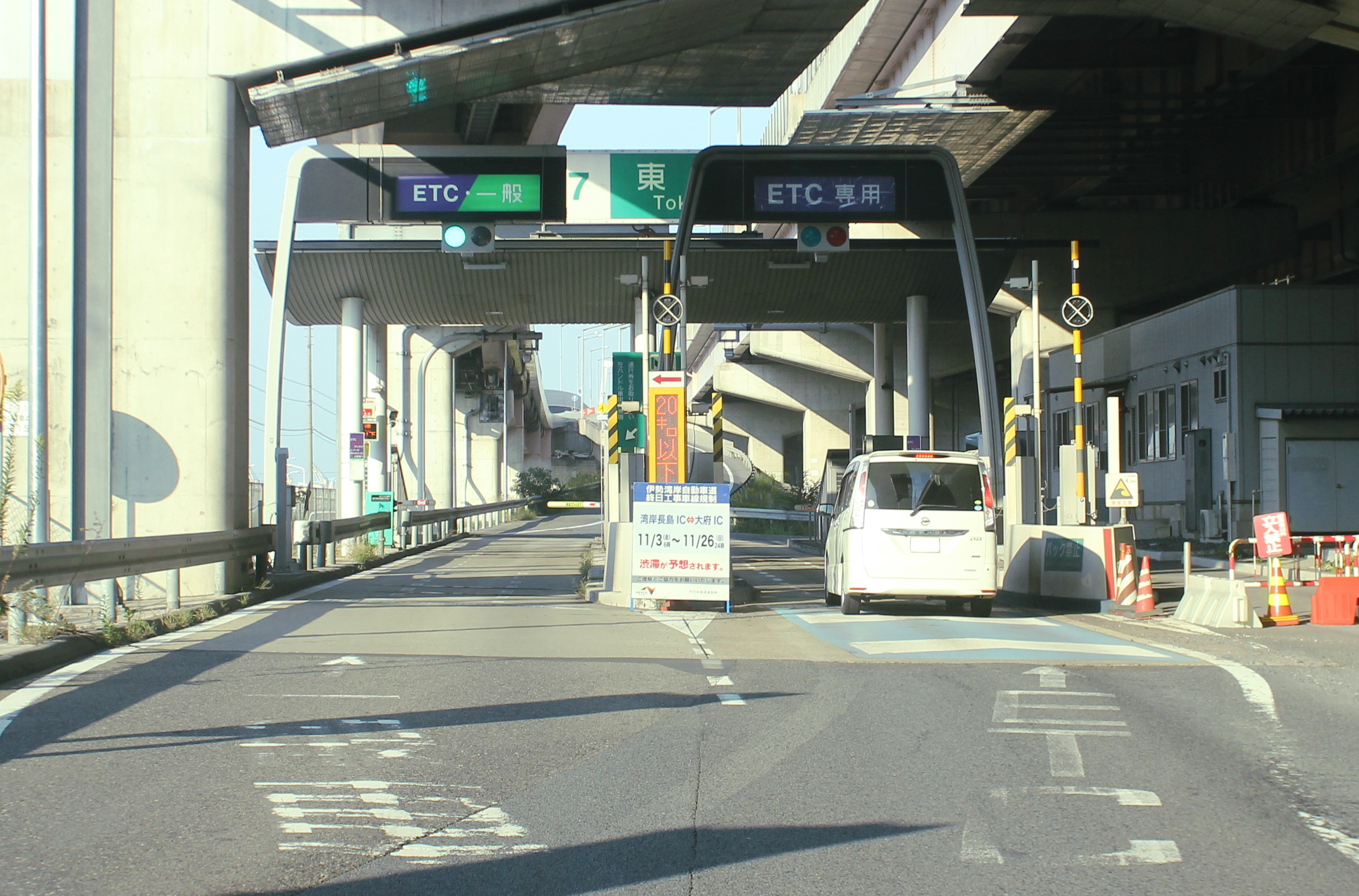 伊勢湾岸道路 東海インターチェンジ